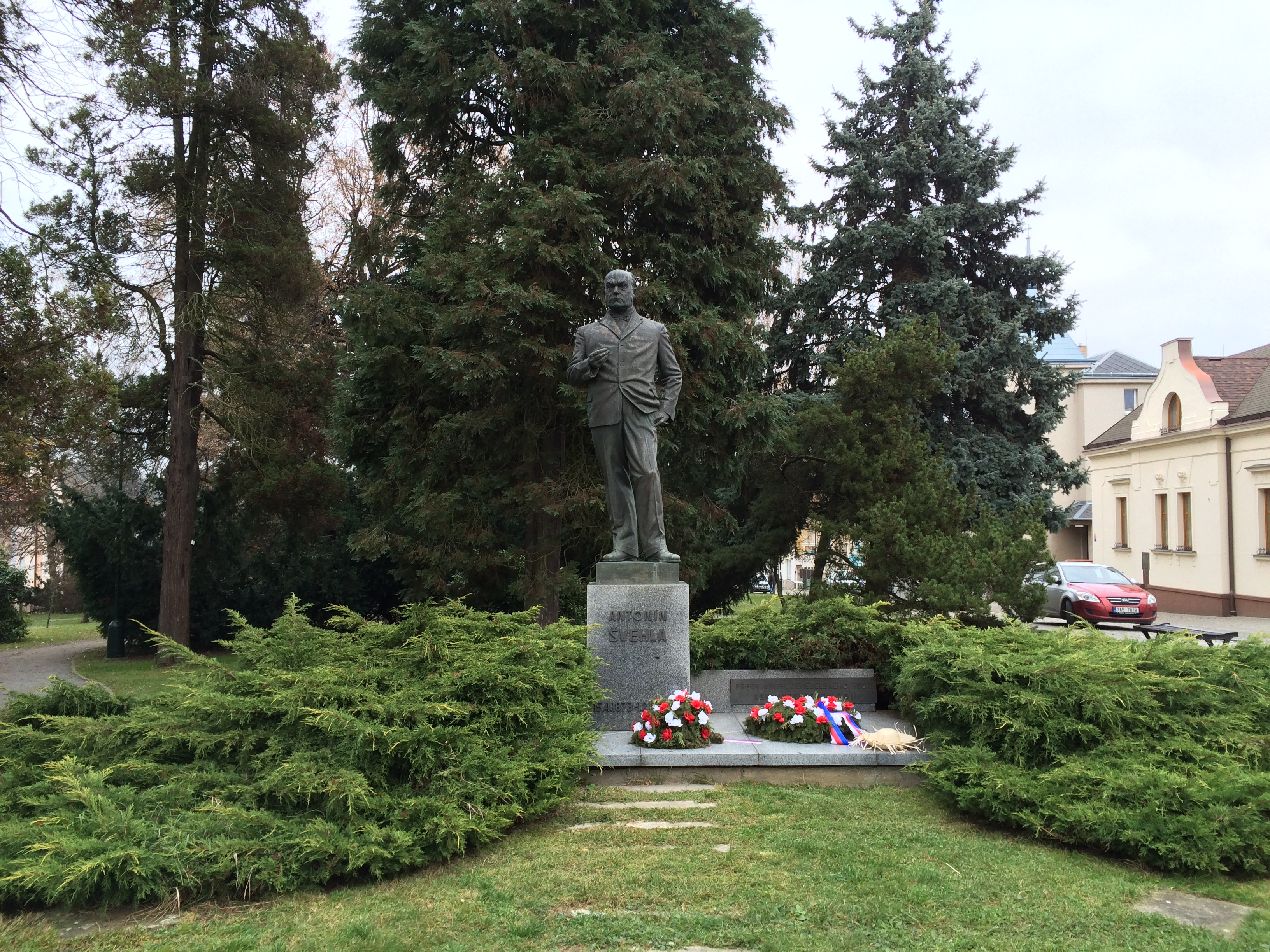 Socha Antonína Švehly v Říčanech v parku Antonína Švehly mezi ulicemi 17. listopadu a cesta Svobody.